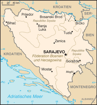 Politische Karte von Bosnien und Herzegowina.